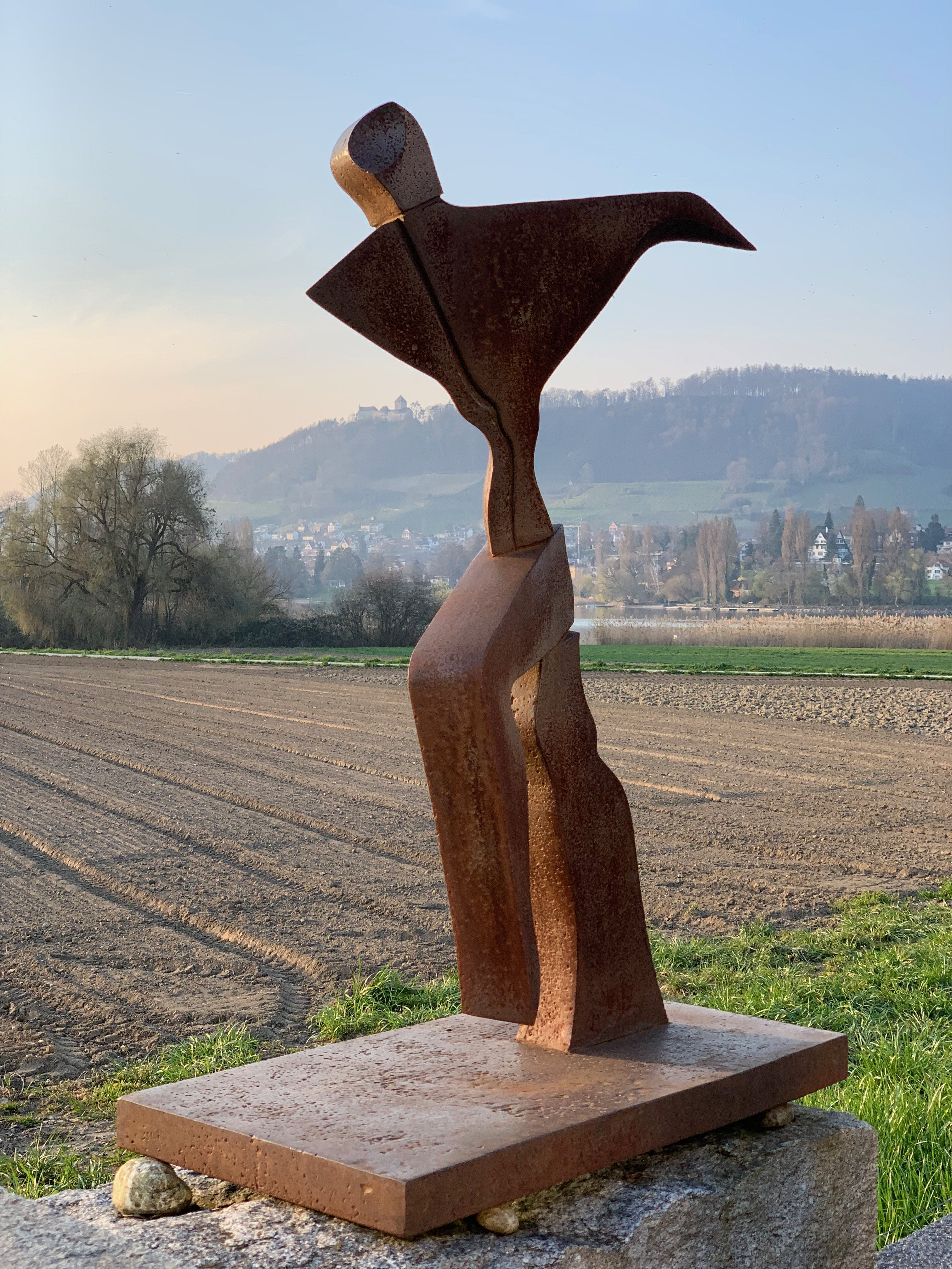 Sylphe - Eisenguss, 100cm, 1978